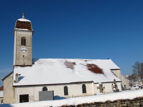 Eglise d'Etalans sous la neige